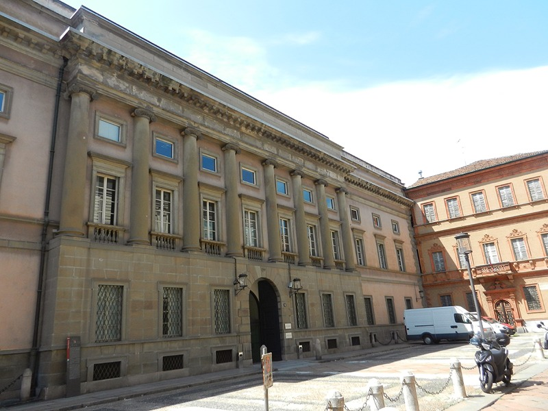 Milano - Palazzo Pozzi Besana